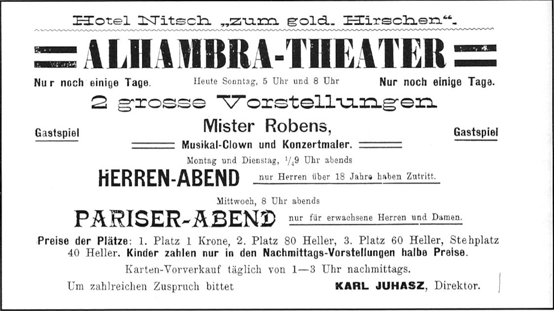 Zeitungsinserat im "Mödlinger Bezirksboten", Nr. 42, 21. Oktober 1906, für das Wanderkino "Alhambra-Theater" von Karl Juhasz im "Hotel Nitsch 'zum goldenen Hirschen'"; "Pariser-Abend" und "Herren-Abend" waren Vorführungen von Aufnahmen spärlich oder gar nicht bekleideter Damen / en: advertisement in the newspaper "Mödlinger Bezirksbote" for the "wandering cinema" "Alhambra-Theater" of Karl Juhasz, playing in Hotel Nitsch "zum goldenen Hirschen"; biggest part of the advertisement is for the evening-screenings (8 pm) "Pariser Abend" and "Herren Abend", which means, that erotic movies were shown and access was only allowed for adults and people older than 18